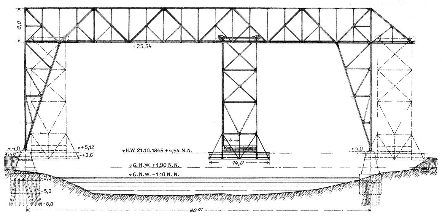 Schwebefähre über die Oste bei Osten